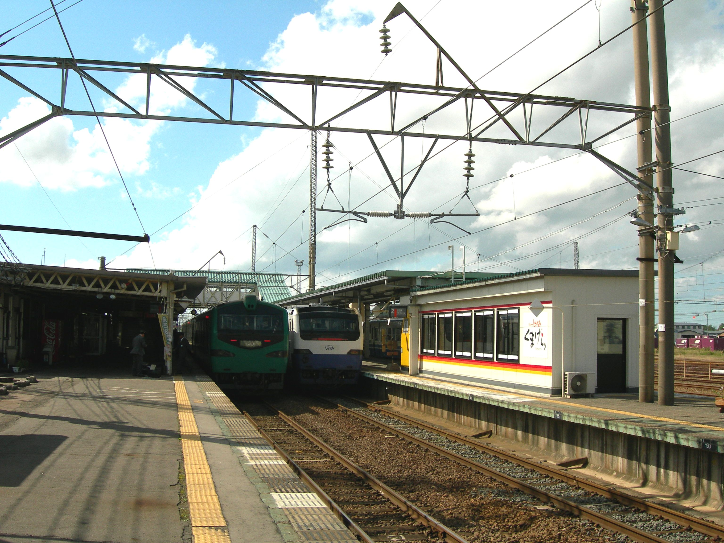 東能代駅ホーム